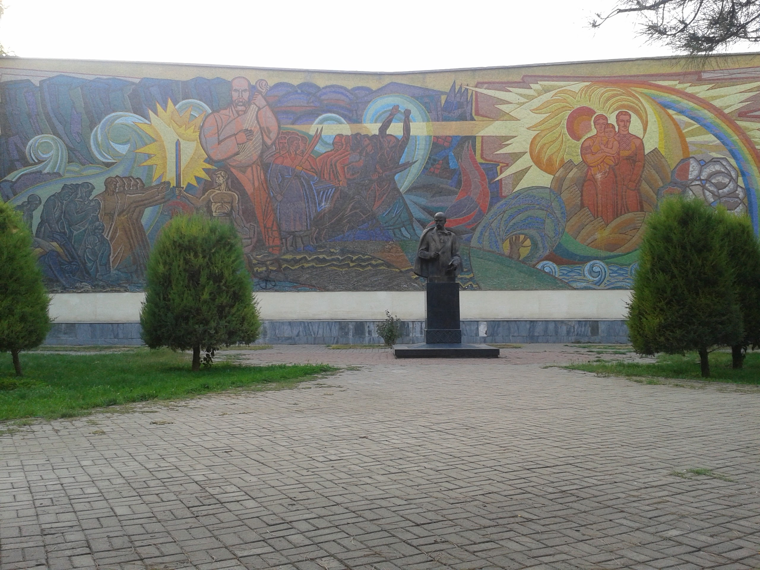 Пам'ятник і панно на стіні школи №110.